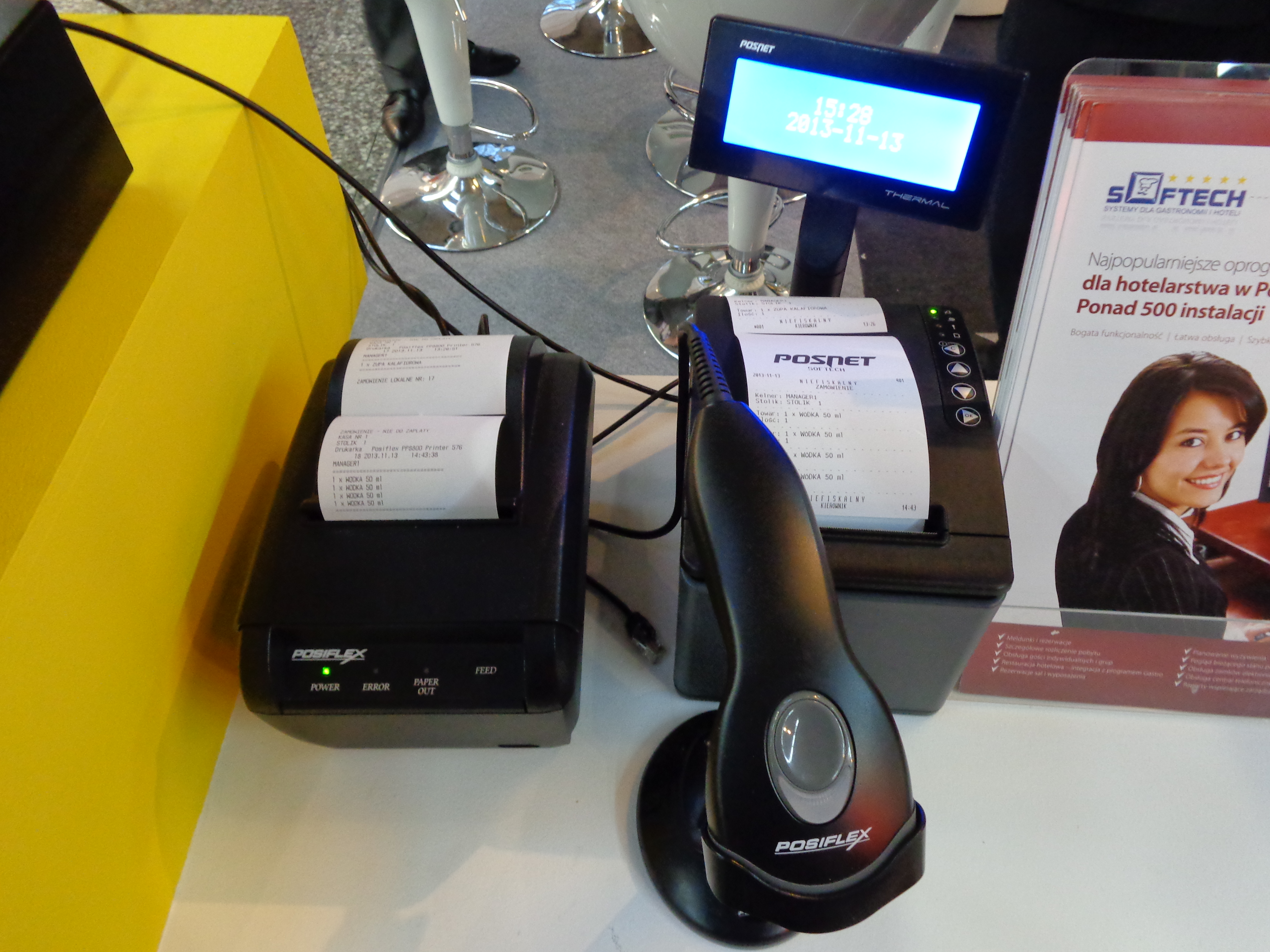 Bonownik kelnerski, czytnik kodów kreskowych i drukarka fiskalna prezentowane podczas Targów HORECA 2013 w Krakowie.